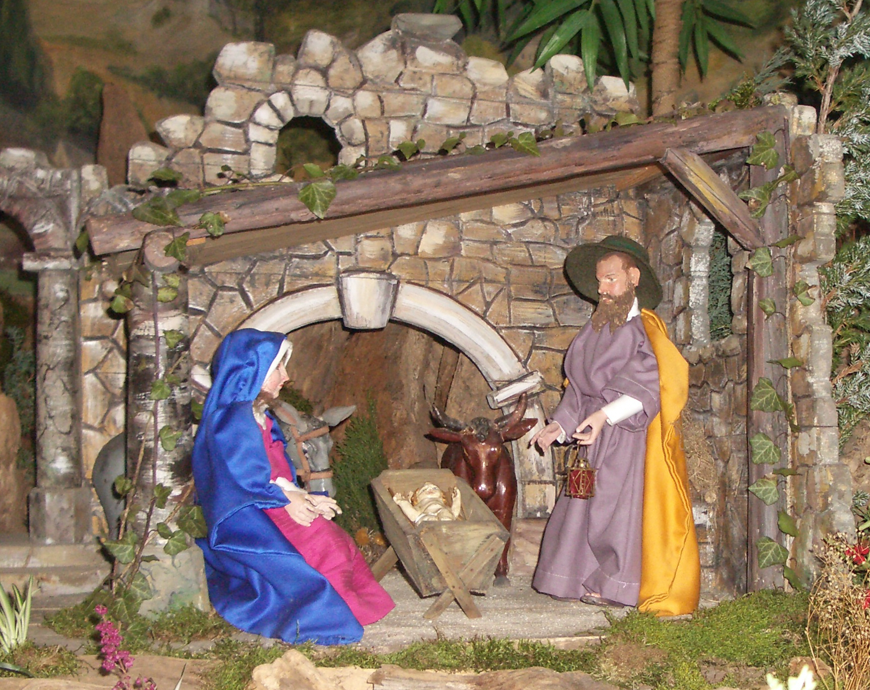 Balzhausen, Leonhardskapelle, Krippe